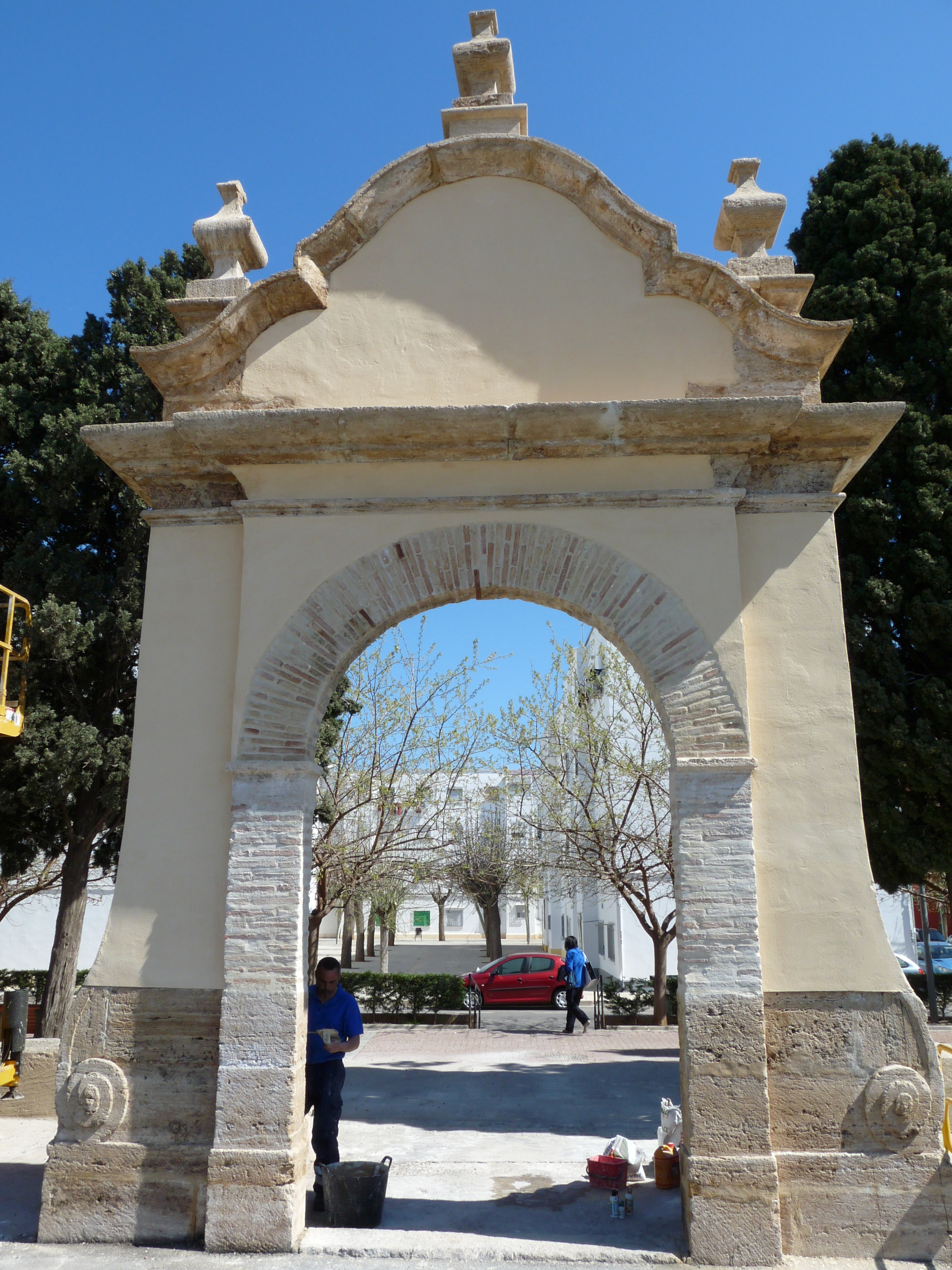 Puerta del castillo de Benetússer